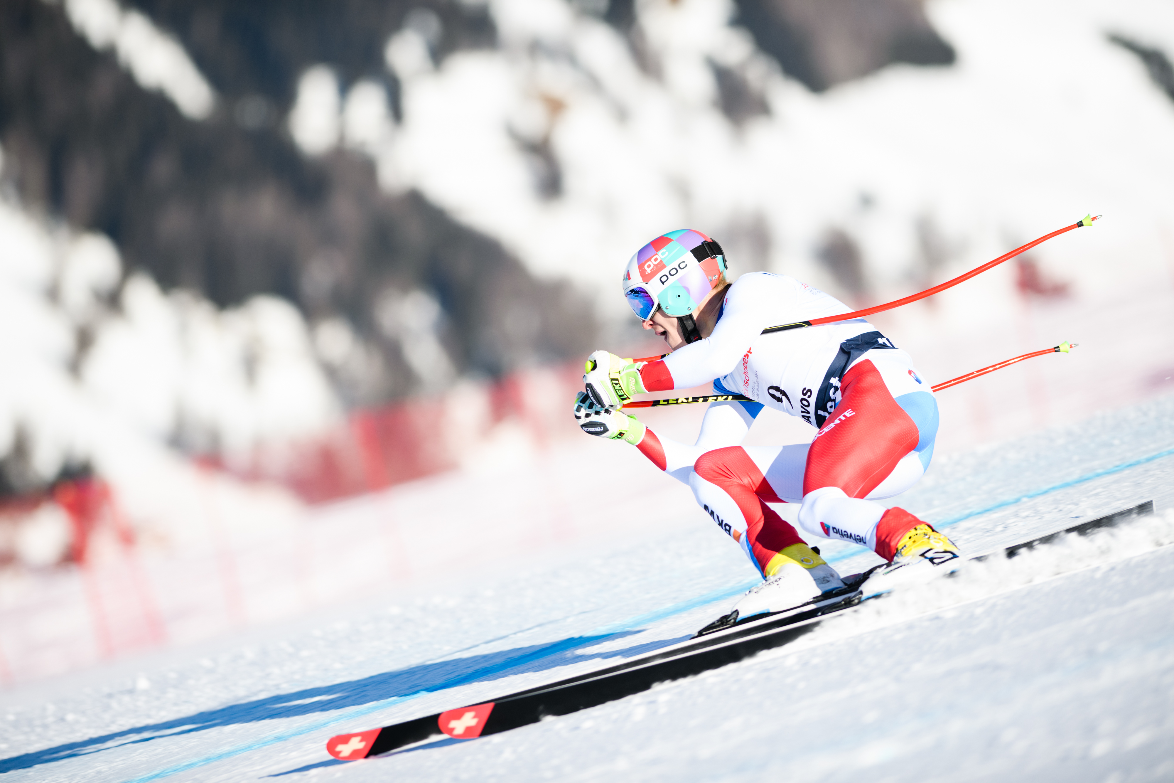 Marco Odermatt (Schweiz) gewinnt die Abfahrt der Alpinen Ski-Juniorenweltmeisterschaft der FIS in Davos 2018, fotografiert am Mittwoch, 31. Januar 2018. (Bild: Manuel Lopez)